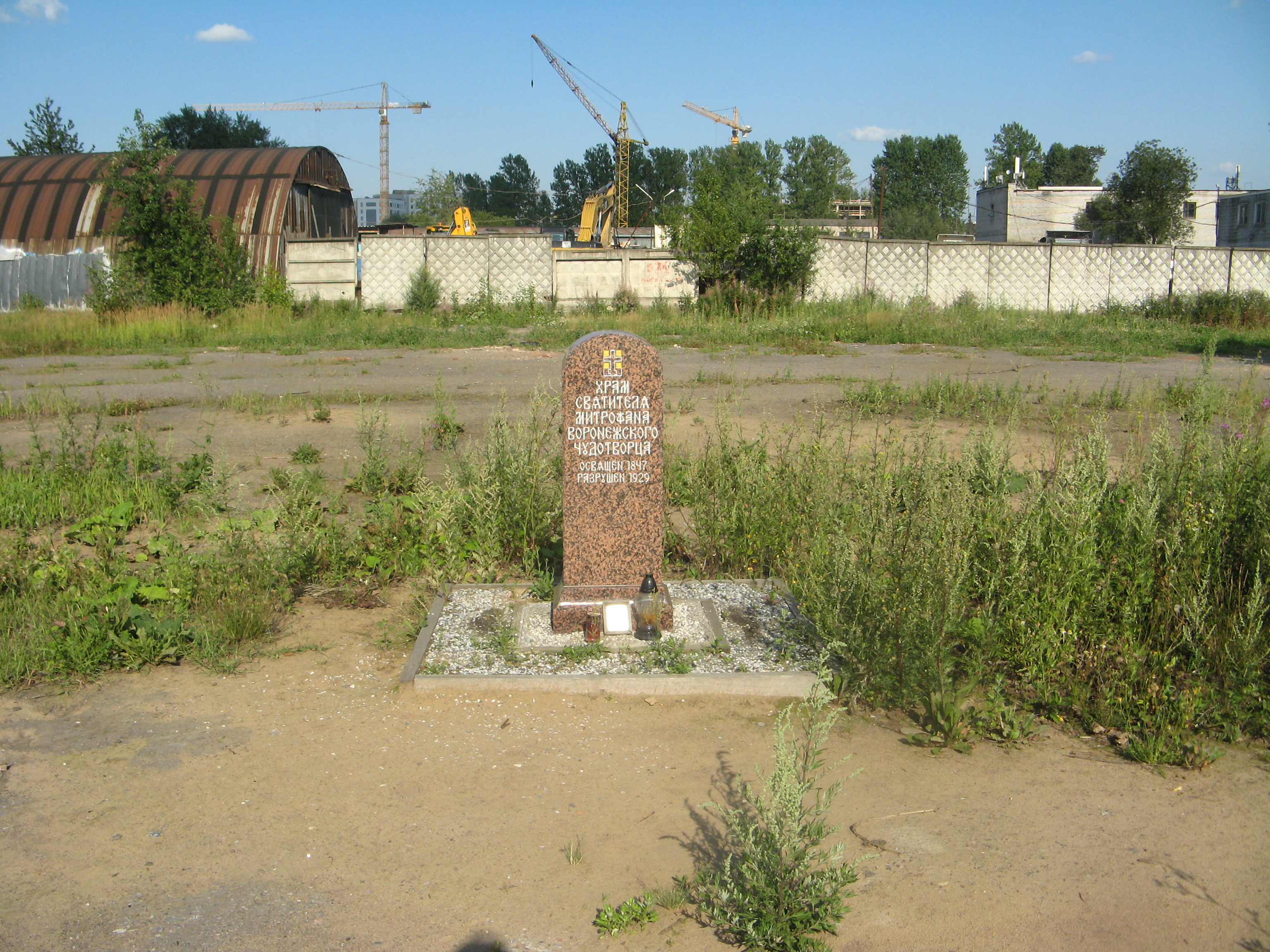 Памятные места: храма святого Митрофана Воронежского, церкви Всемилостивого Спаса, церкви Сошествия Святого Духа и Семи Отроков Эфесских (Кекинской), часовни святого благоверного князя Александра Невского, часовни странника А. Крайнева, часовни для отпеваний, церковного дома с часовней и службами Лютеранского кладбища, склепа над могилой вице-адмирала В.М. Головнина и его семьи: Митрофаньевское шоссе, Митрофаниевское кладбище, Адмиралтейский район, Санкт-Петербург